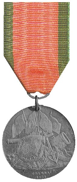 Turkse Medaille voor Britse troepen